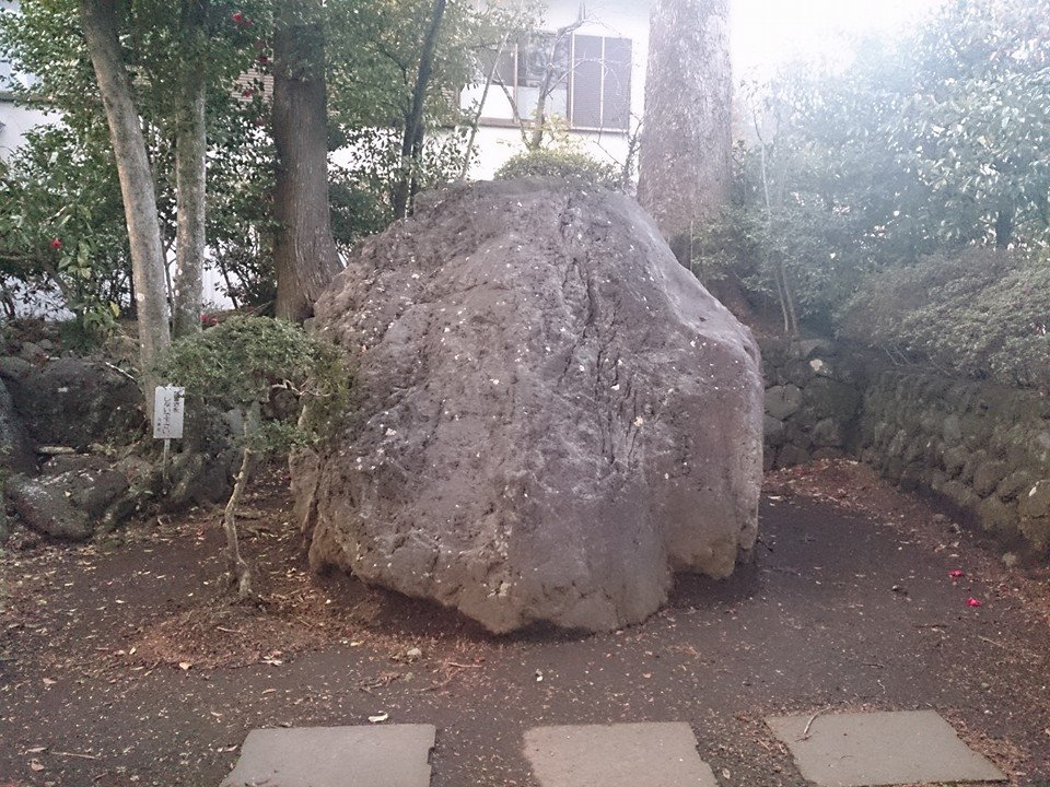 日興上人の説法をされたときにつかわれた石